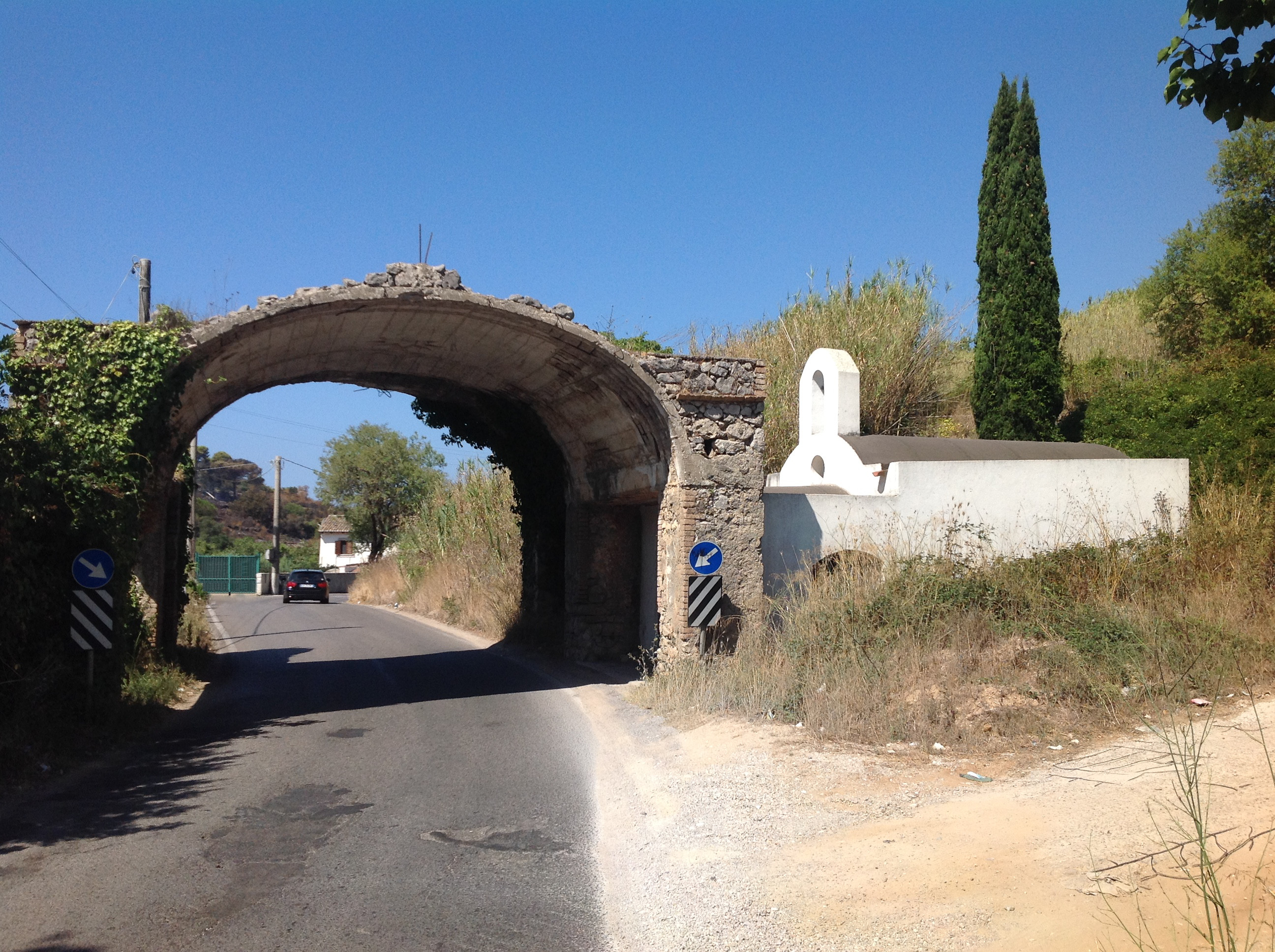 Veduta esterna della cappella e dell'arcone.